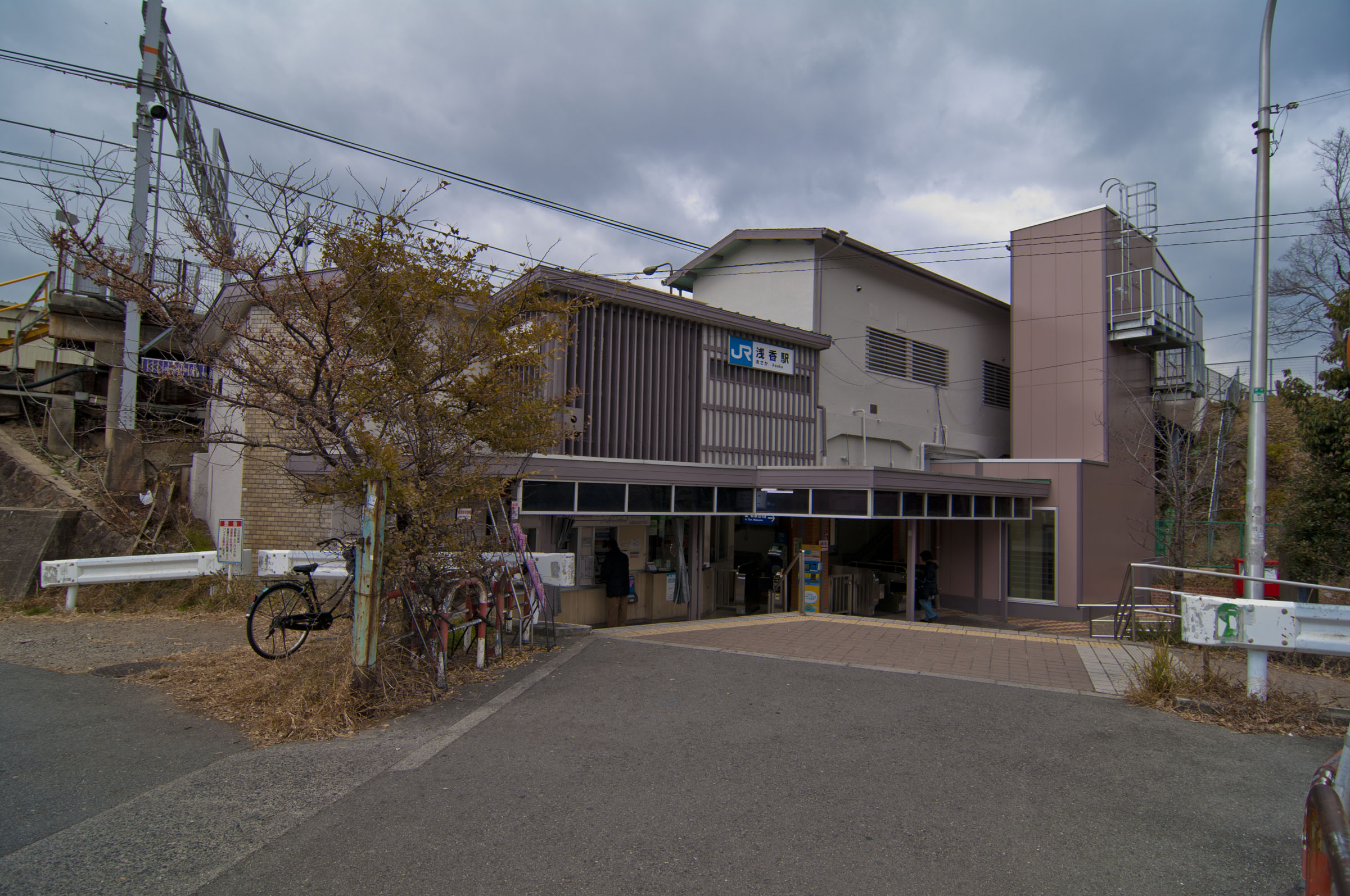 西日本旅客鉄道阪和線浅香駅駅舎